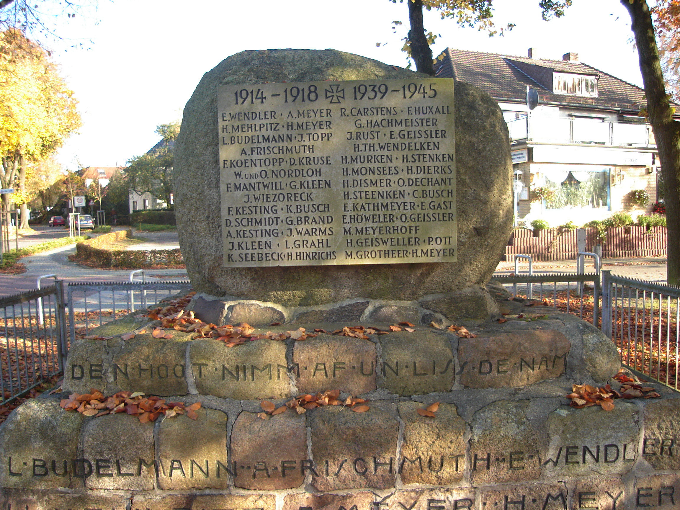 OsterhagenIhlpohl_AmDenkmal-Denkmal.jpg